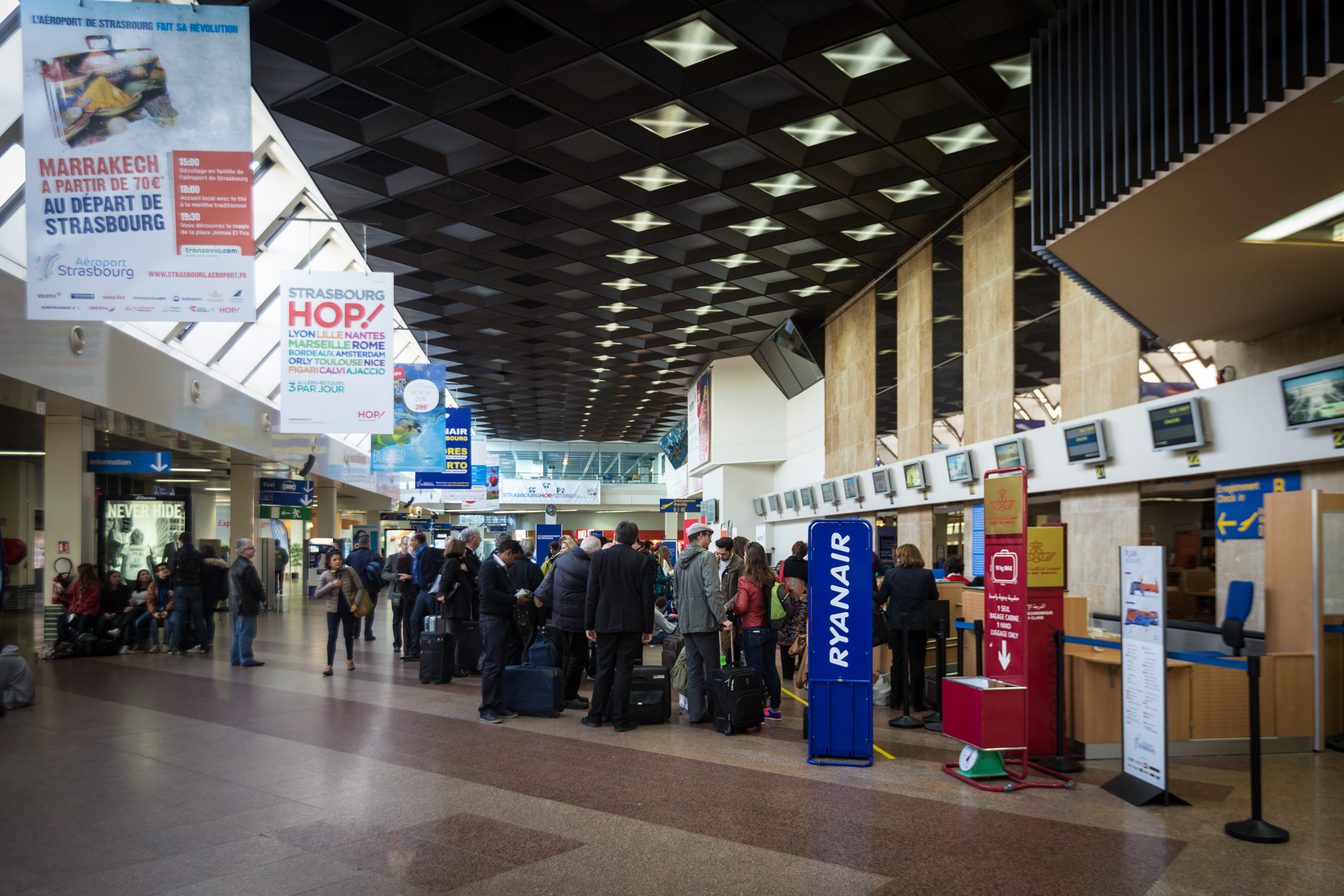 Aéroport Strasbourg Entzheim SXB avril 2015